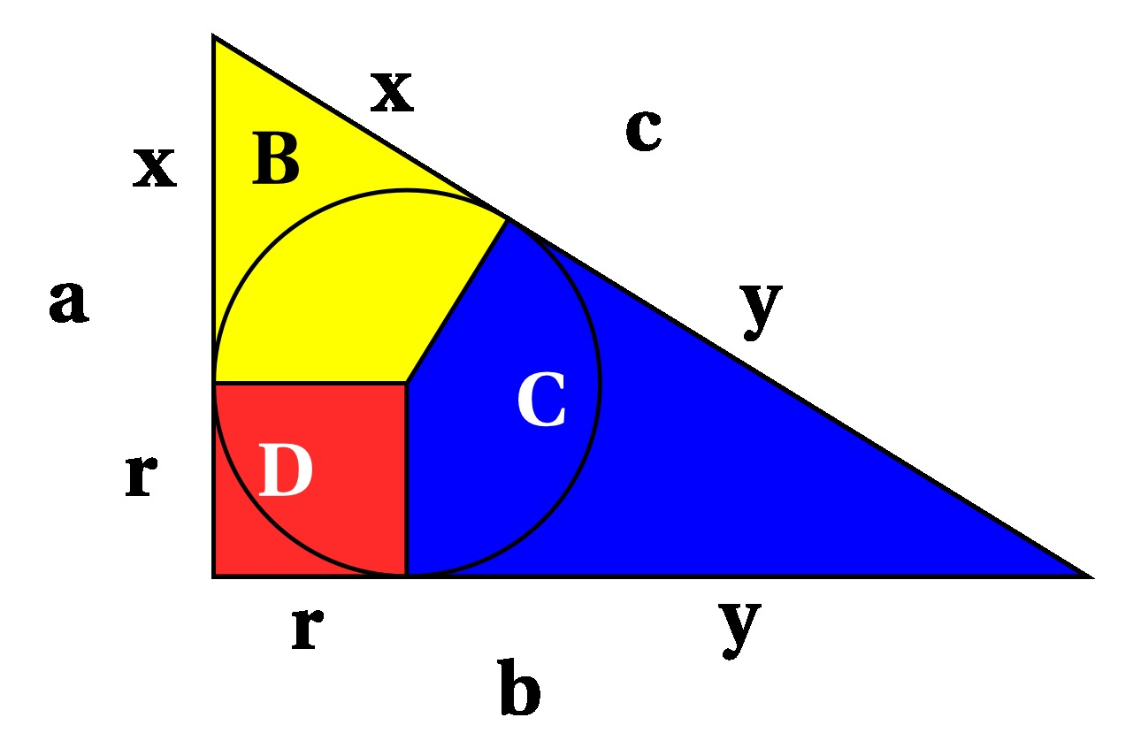 Triângulo Rectângulo com Circunferência inscrita